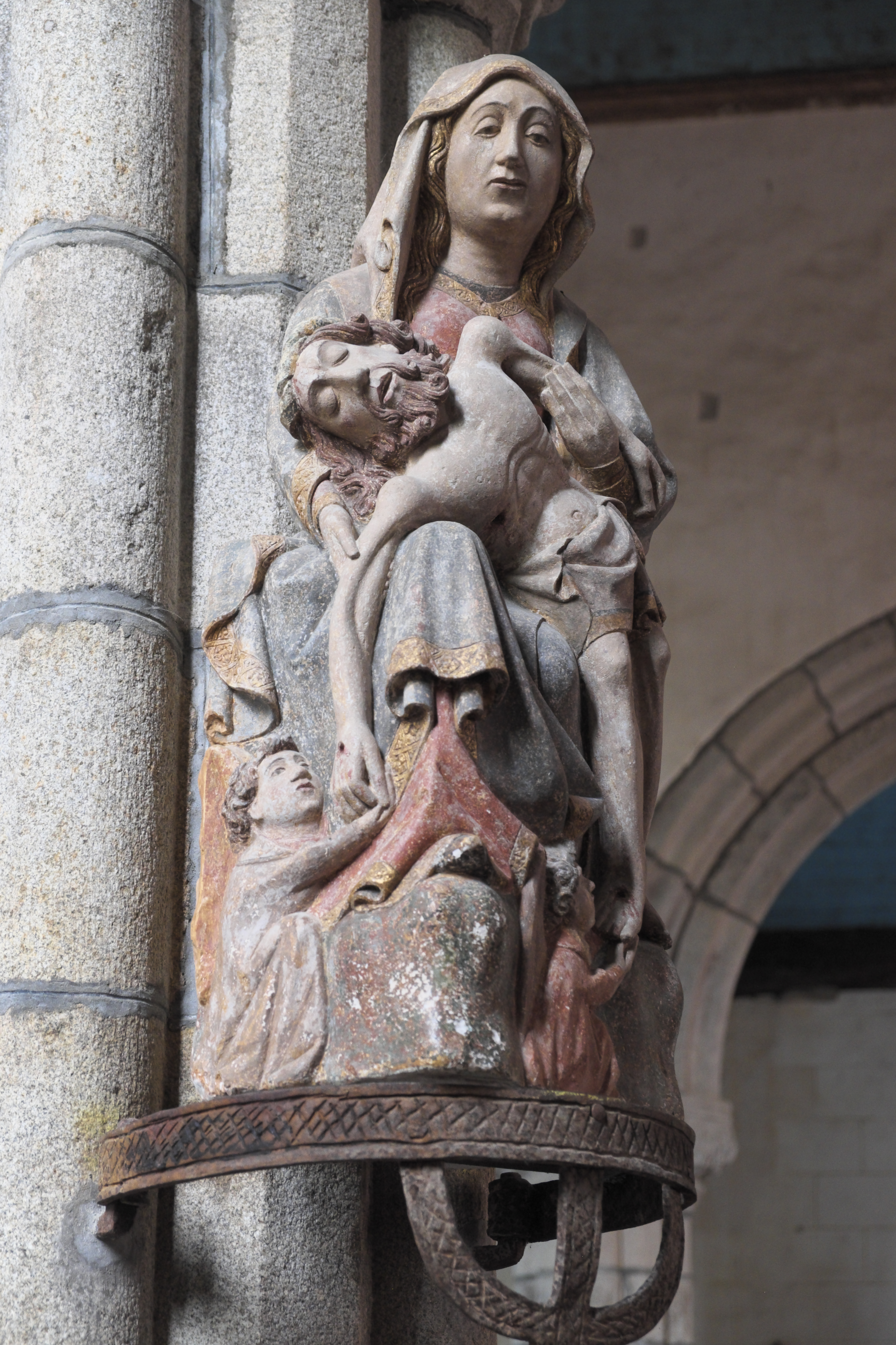 Kapelle Saint-Herbot in Saint-Herbot (Plonévez-du-Faou) im Département Finistère (Region Bretagne/Frankreich), Pietà aus dem 16. Jahrhundert